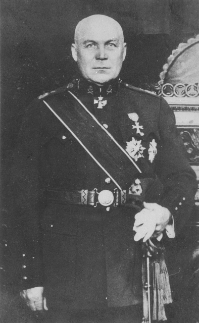 MuuseumikoguFotokoguOlemusfotoSäilivusmääramata legend Kindralmajor (12.03.1918) lõpetas Vilno Sõjakooli alamleitnandina 1899. 21.10.1918 I Div. ülem 1.07.1921 III Div. ülem 1.10.1922 - 15.09.1933 I Div. ülem aug - okt 1920 ja 07.02.1932 - 18.05.1933 sõjaminister 1933 st Sõjanõukogu liige, arreteeriti 19.12.1940 Teenistuskiri: Polkovnik (1916) al. polk. (1915) Kapt. (1911) St. kapt. (1907) Ltn. (1903) Autasud: VR I/1 Kotkarist 1. kl Valgerist III kl (Vt "Sõdur" 1931, lk 1253; "Sõdur" 1935", lk 1384) Fotograaf teadmata Repro Jüri Karm kommentaar Fk 2625:1 - 109 Fotod Eesti Vabariigi (1918 - 1940) Kaitseväe, Kaitseliidu, Naiskodukaitse ja Noorkotkaste liikmeskonnast, valdavalt portreefotod. Fotod saadi ümberpildistuseks Eesti Kaitseliidu Muuseumi juhatajalt Olavi Pungalt, kes abistas ka fotode legendeerimisel Andis üle ERMi arhivaar Jana Reidla. v.v. akt ?